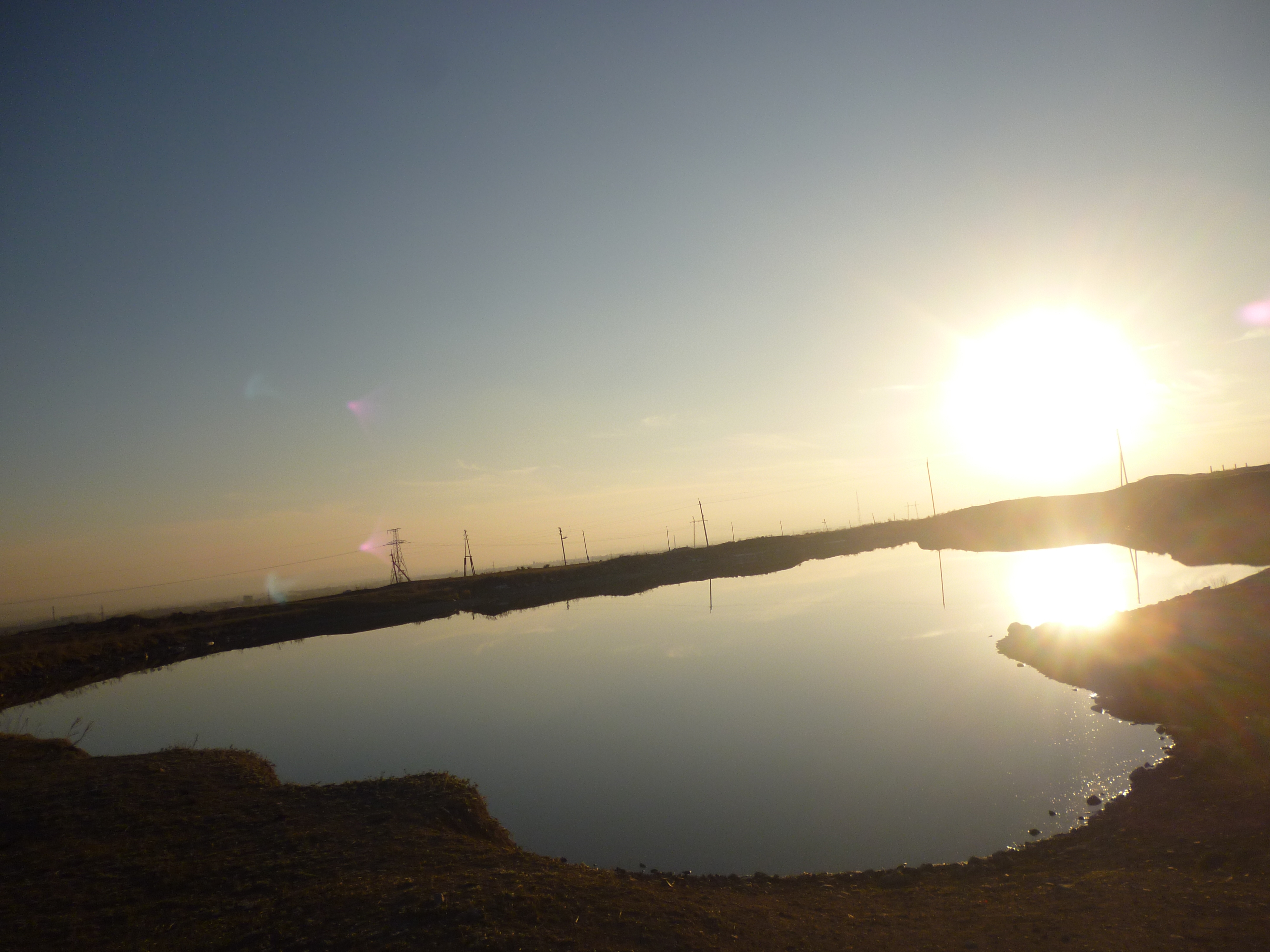 Լճակ Հացիկ գյուղի հյուսիս-արևելյան մասում